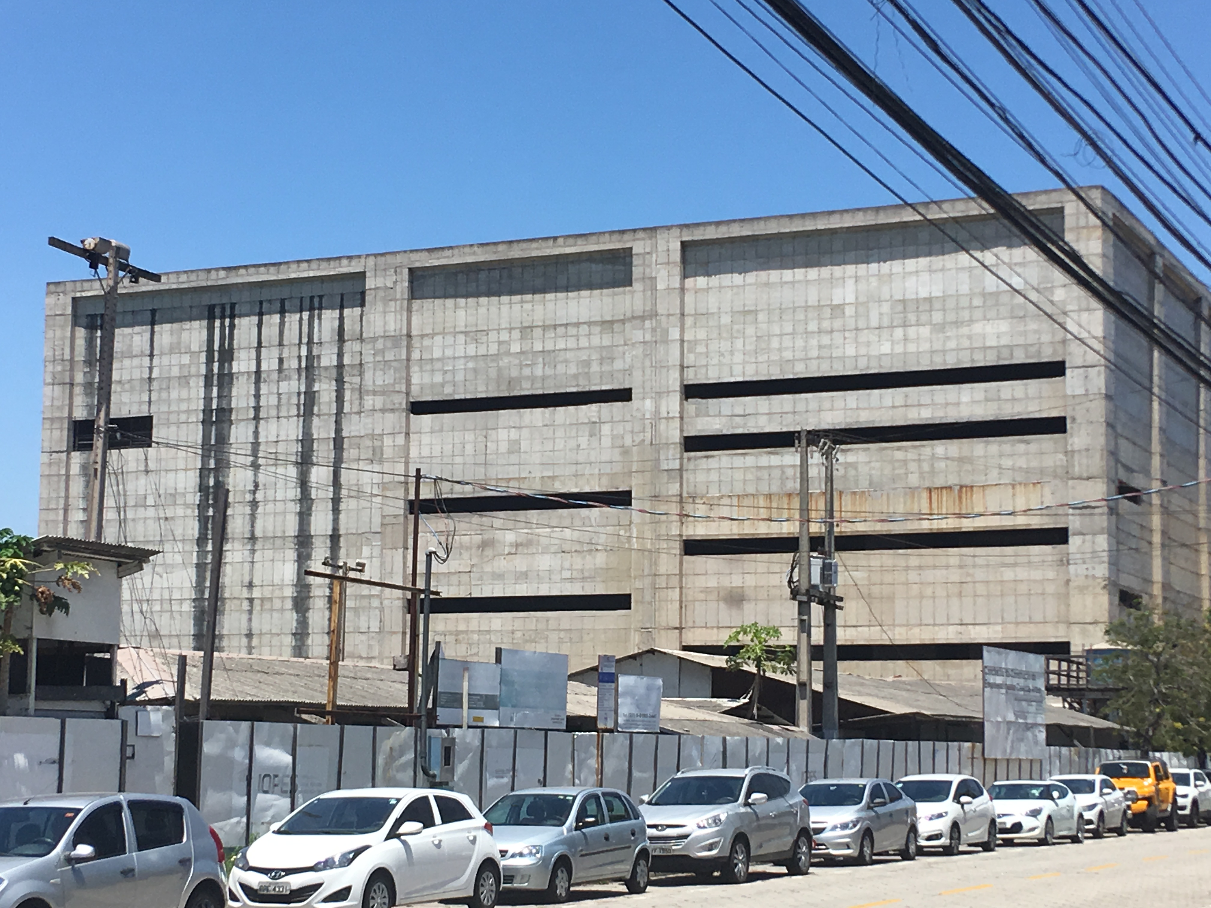 Parede com sinais de deterioração.